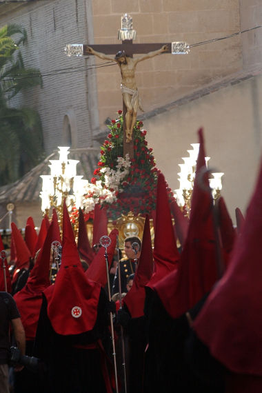 Cristo de la Misericordia, titular de la Cofradía del mismo nombre. Obra de Domingo Beltrán del siglo XVI. Semana Santa de Murcia (España).